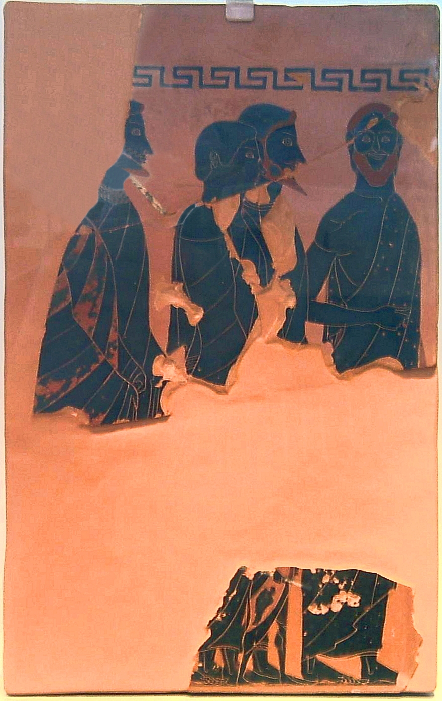 Grabpinakesfragmente des Vasenmalers Exekias, eine von 16 im schwarzfigurigen Stil bemalte Tontafeln, eine Prothesis (Totenklage) und einen Totenzug darstellend, gefunden auf dem Kerameikos in Athen, zwischen 540 und 530 v. Chr., 43 × 37 cm, Antikensammlung Berlin